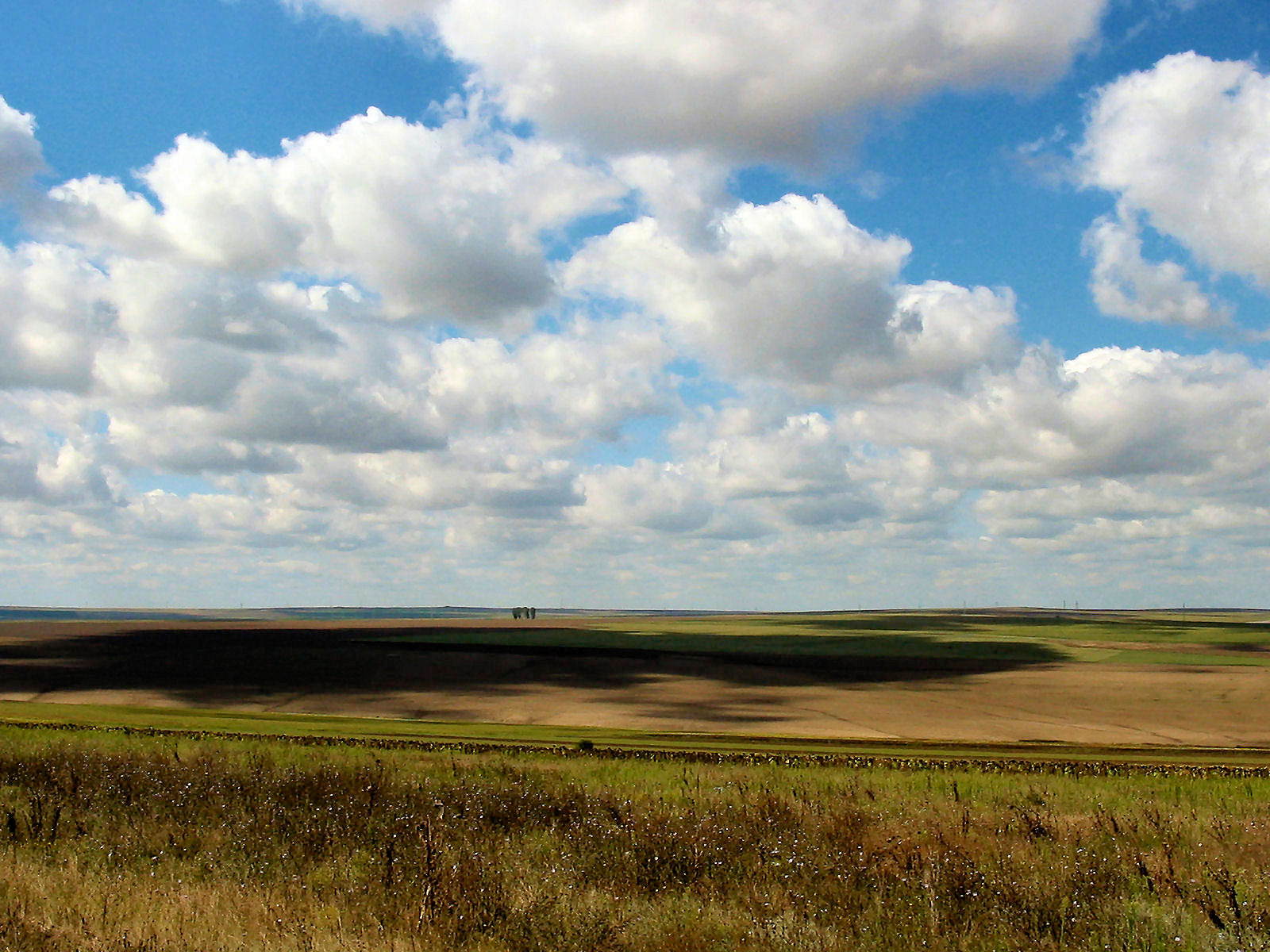 Landcape near Tulcea, Romanian Dobruja.